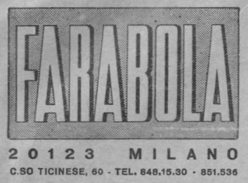 Logo agenzia Farabola dal 1946 al 1975